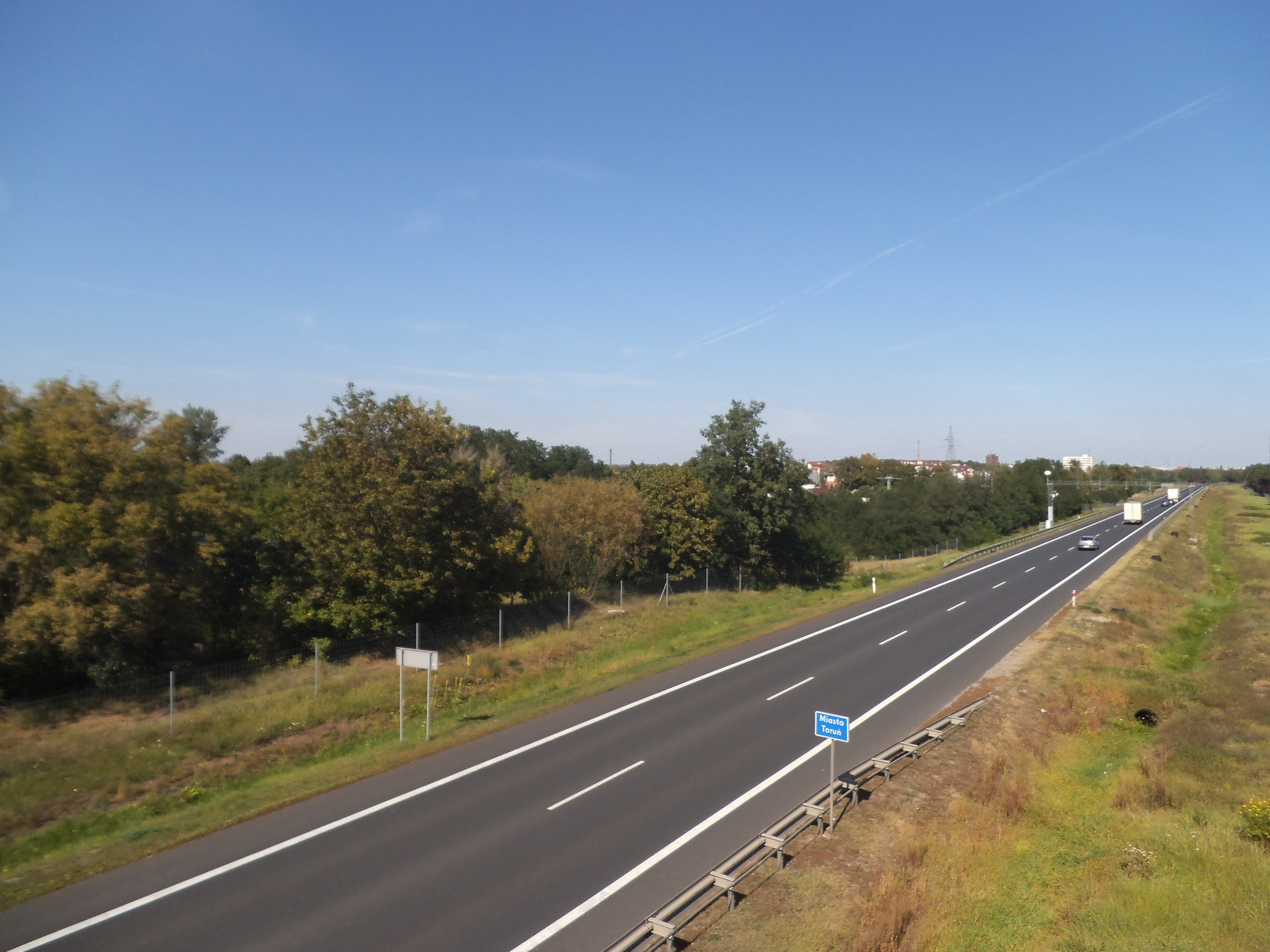 Droga ekspresowej S-10 w Toruniu